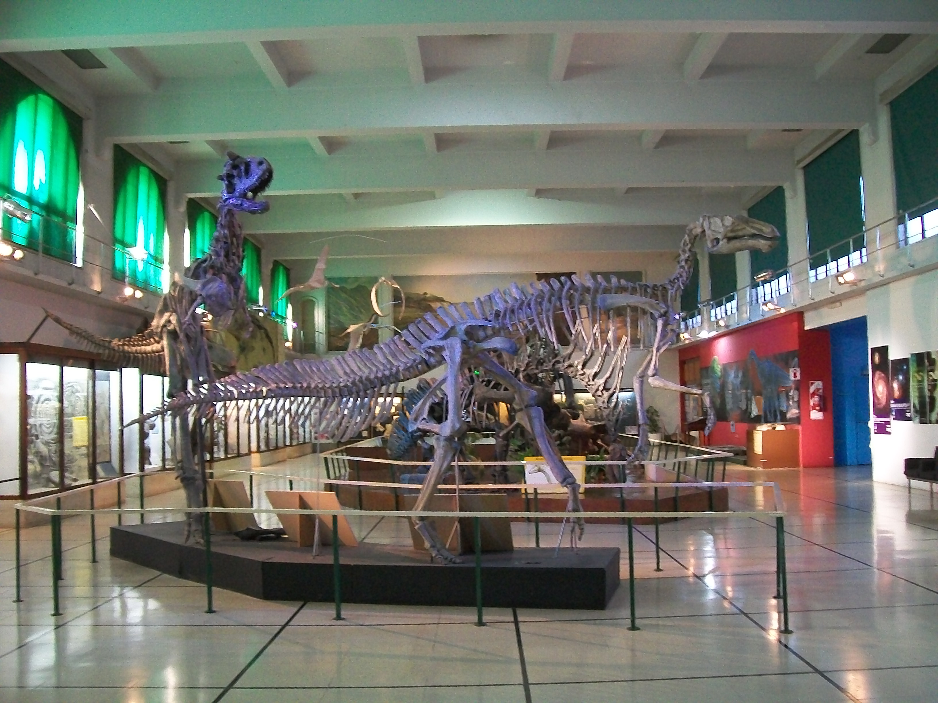 Secernosaurus en Sala de dinosaurios